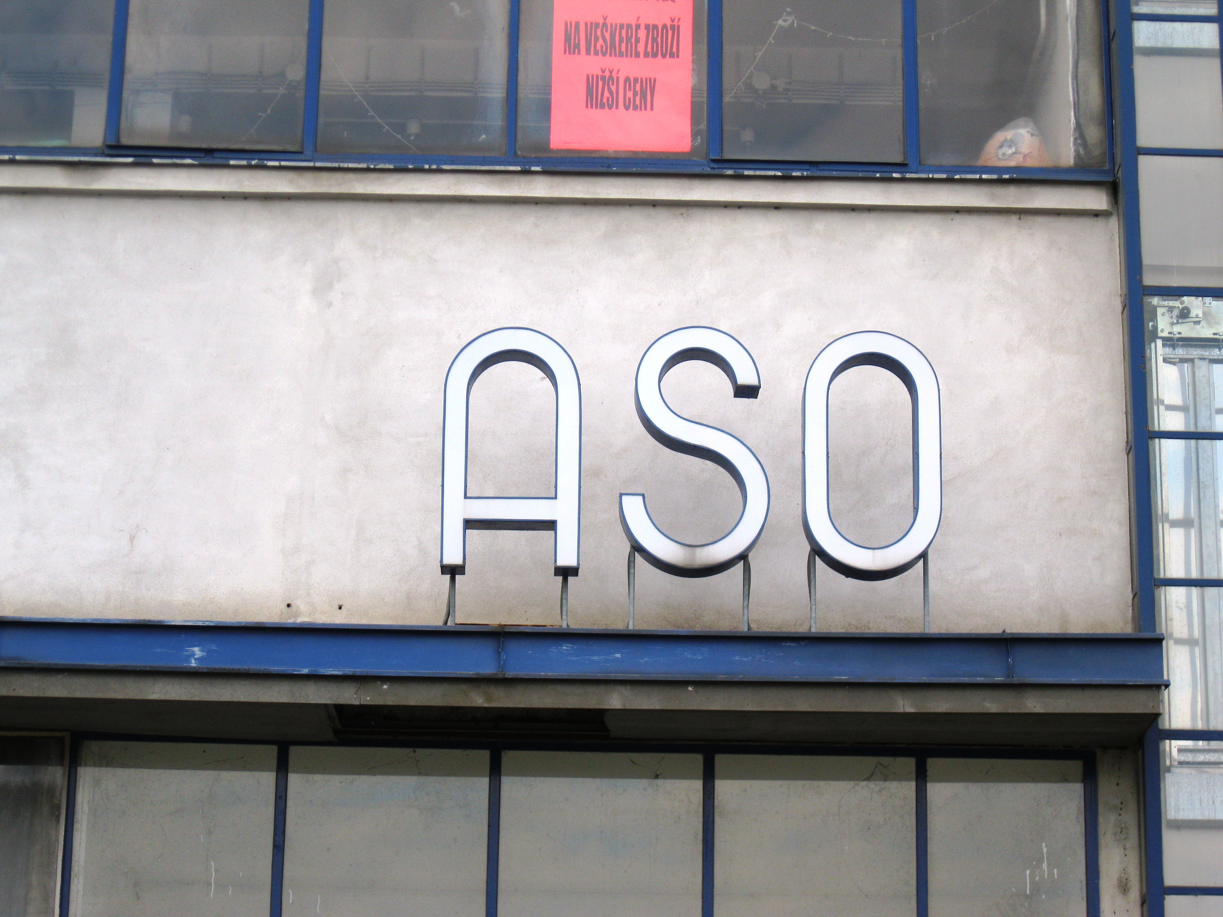 Obchodní dům ASO, Legionářská 739/7, Olomouc